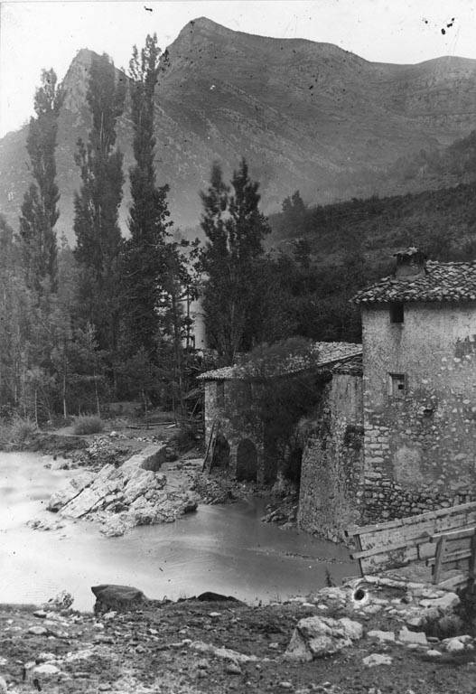 Molí del Pont Vell a Guardiola de Berguedà. Juli Vintró i Casallachs (Entre 1890 i 1911)